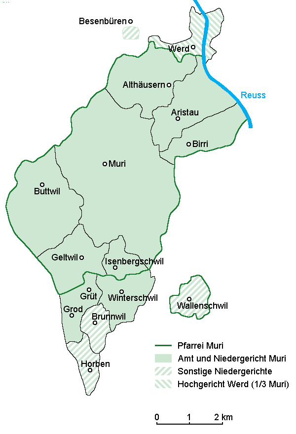 Karte des Amtes Muri in den Freien Ämtern der Alten Eidgenossenschaft (bis 1798)